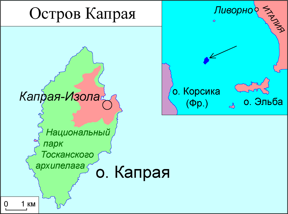 Карта острова Капрая (рус)